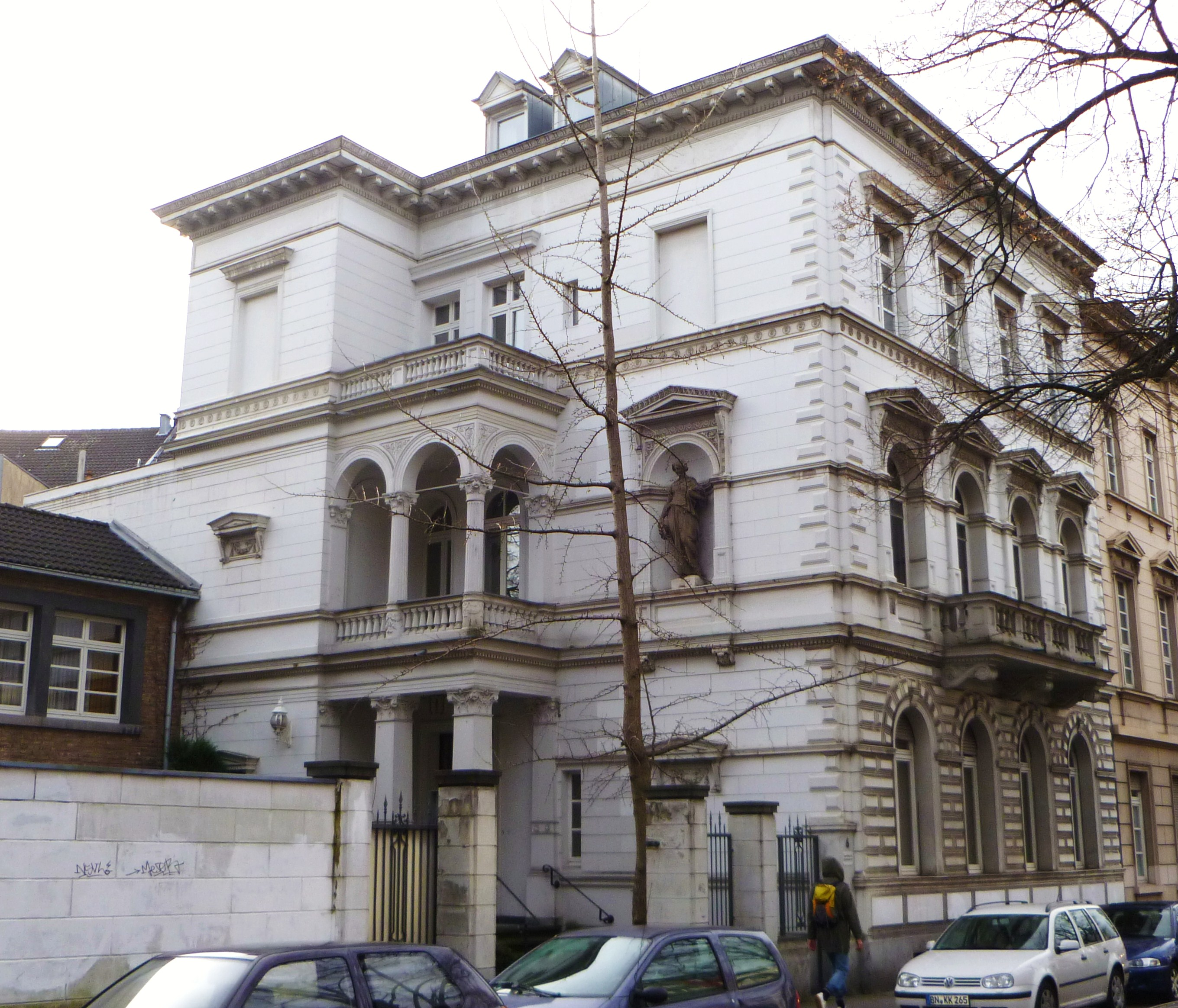 Baudenkmal in Aachen-Frankenberg